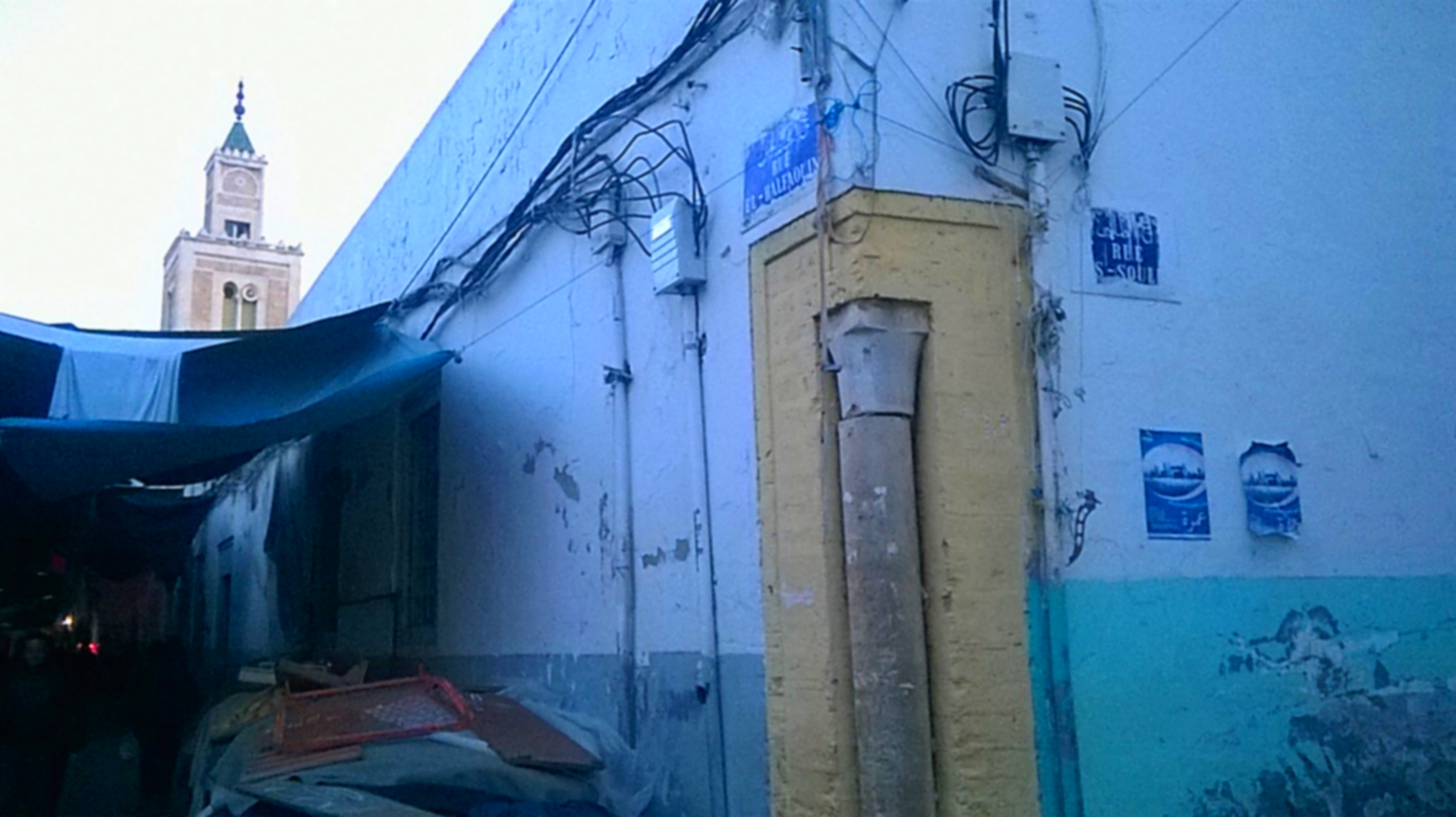 El Halfaouine, Bab Souika , Tunis الحلفاوين, باب سويقة ، تونس